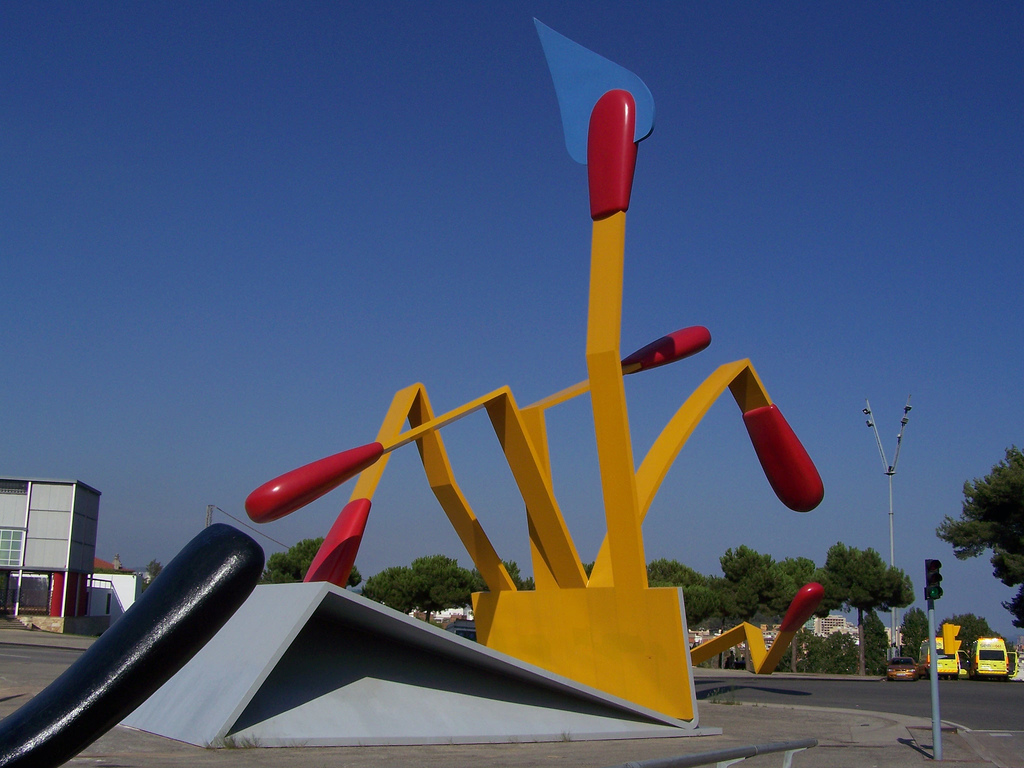 Cerillas